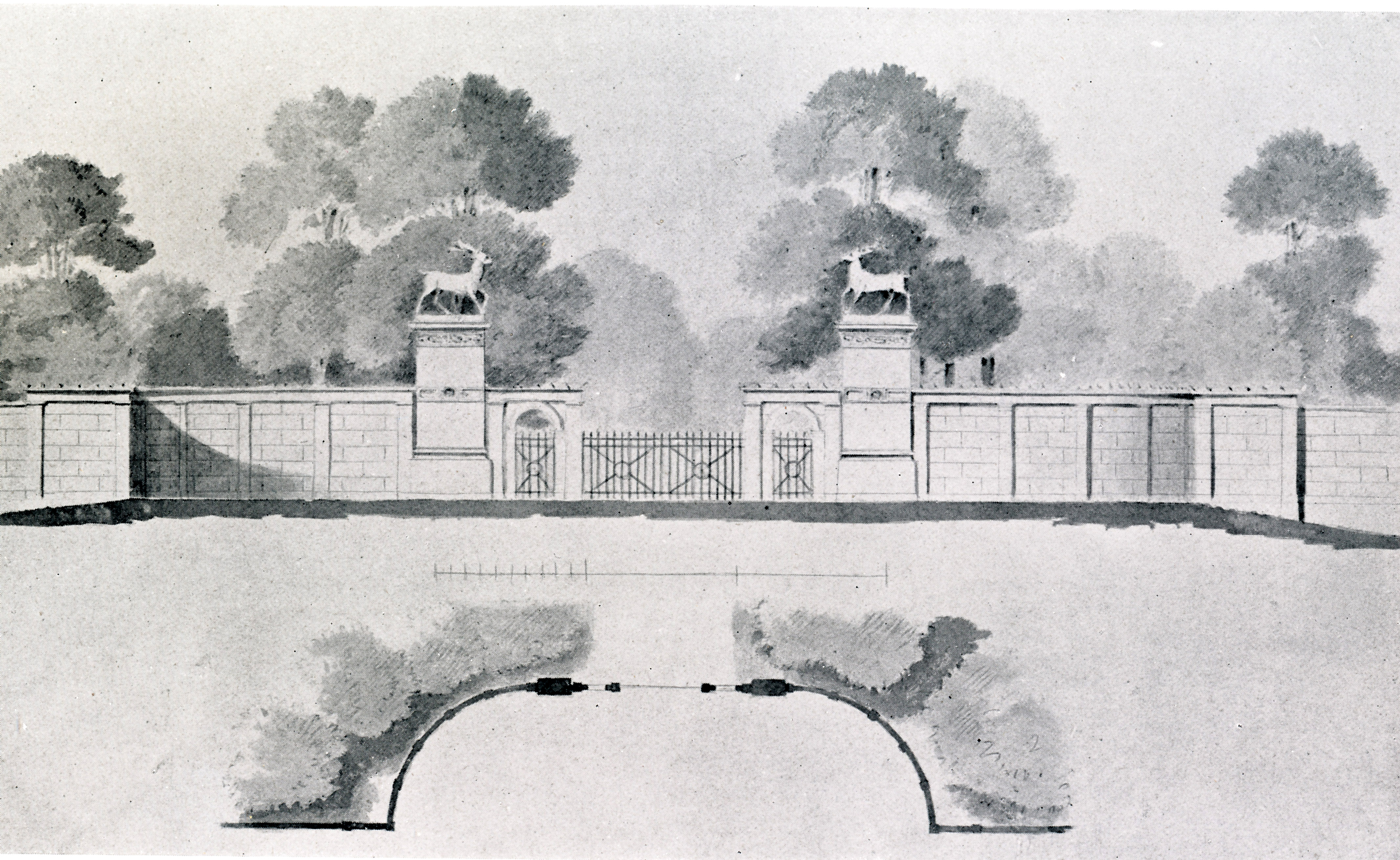 Entwurf zum Wassertor am Park Klein-Glienicke, Ludwig Persius, um 1841